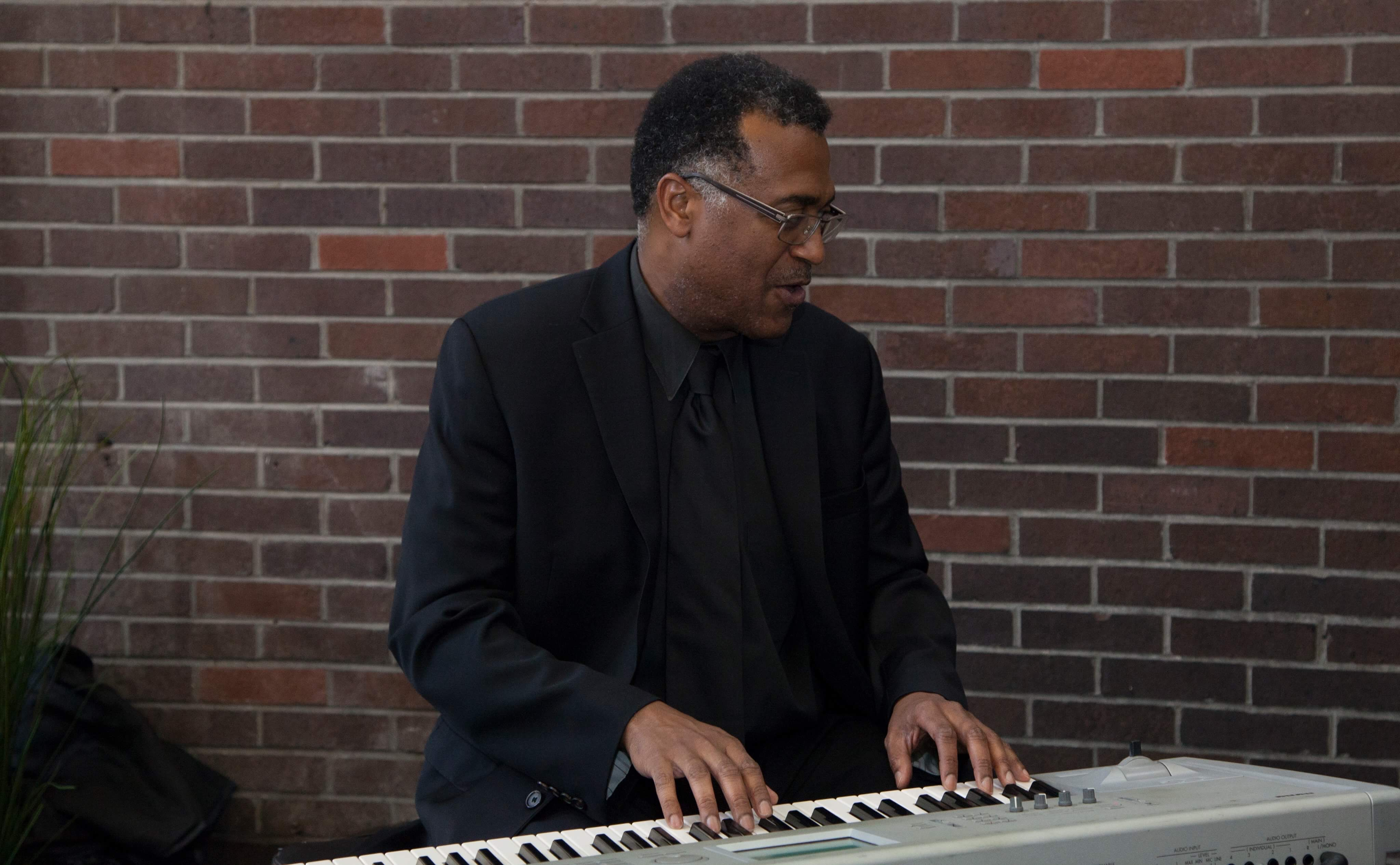 ブルックリンのフェスティバルでキーボードを演奏するラファイエット